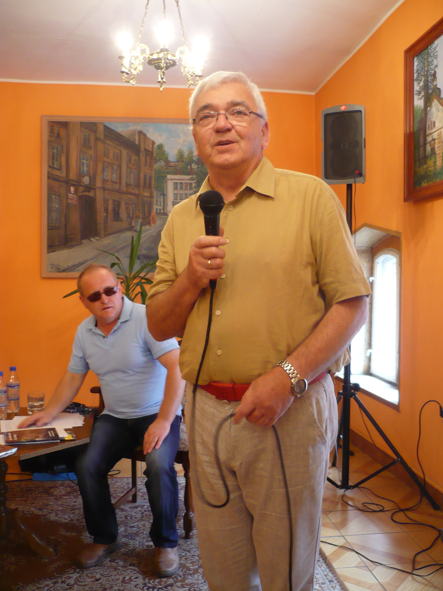 Bogusław Michnik